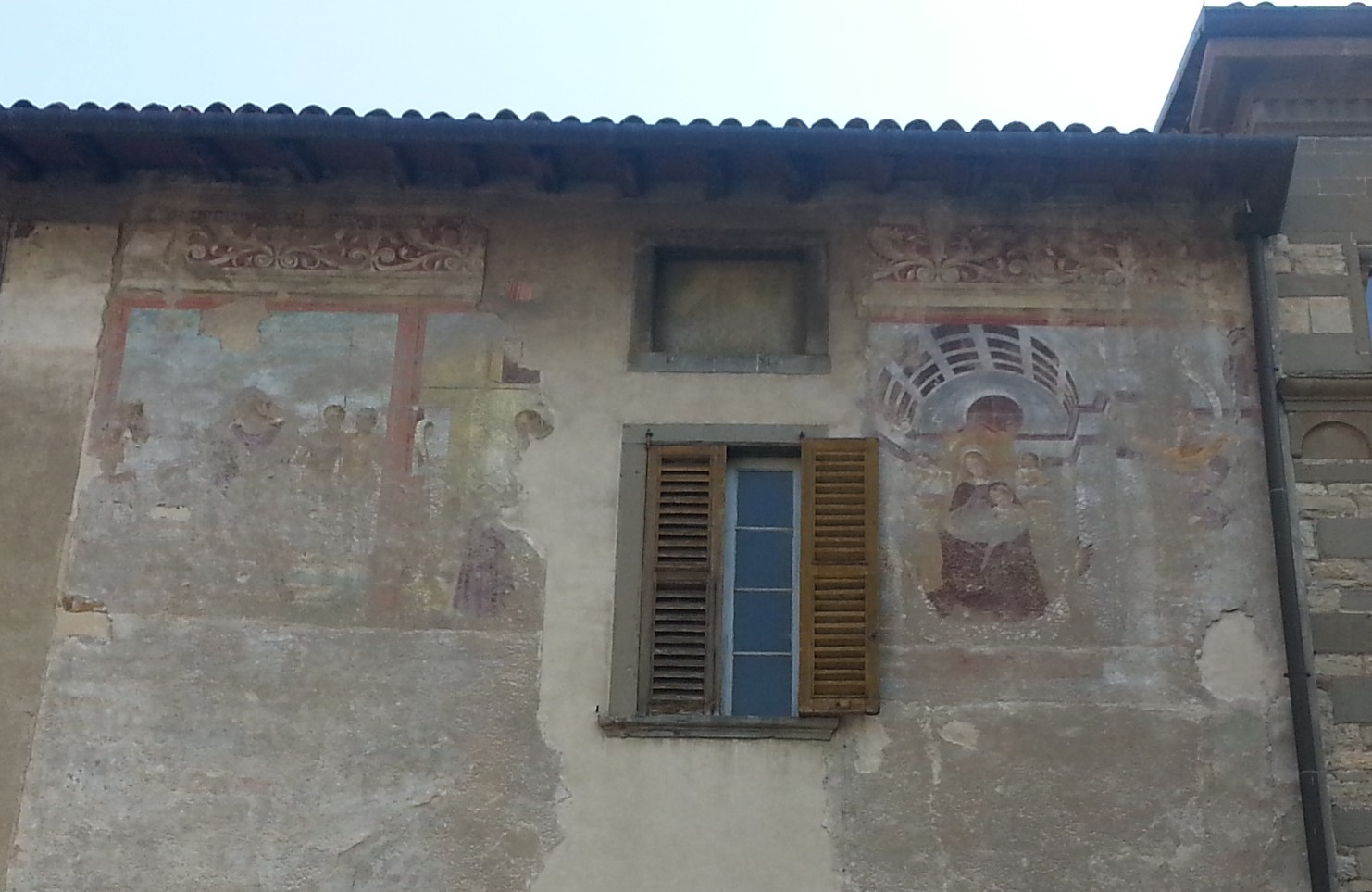 affreschi esterni della chiesa di San Michele opera di Giacomo Scanardi